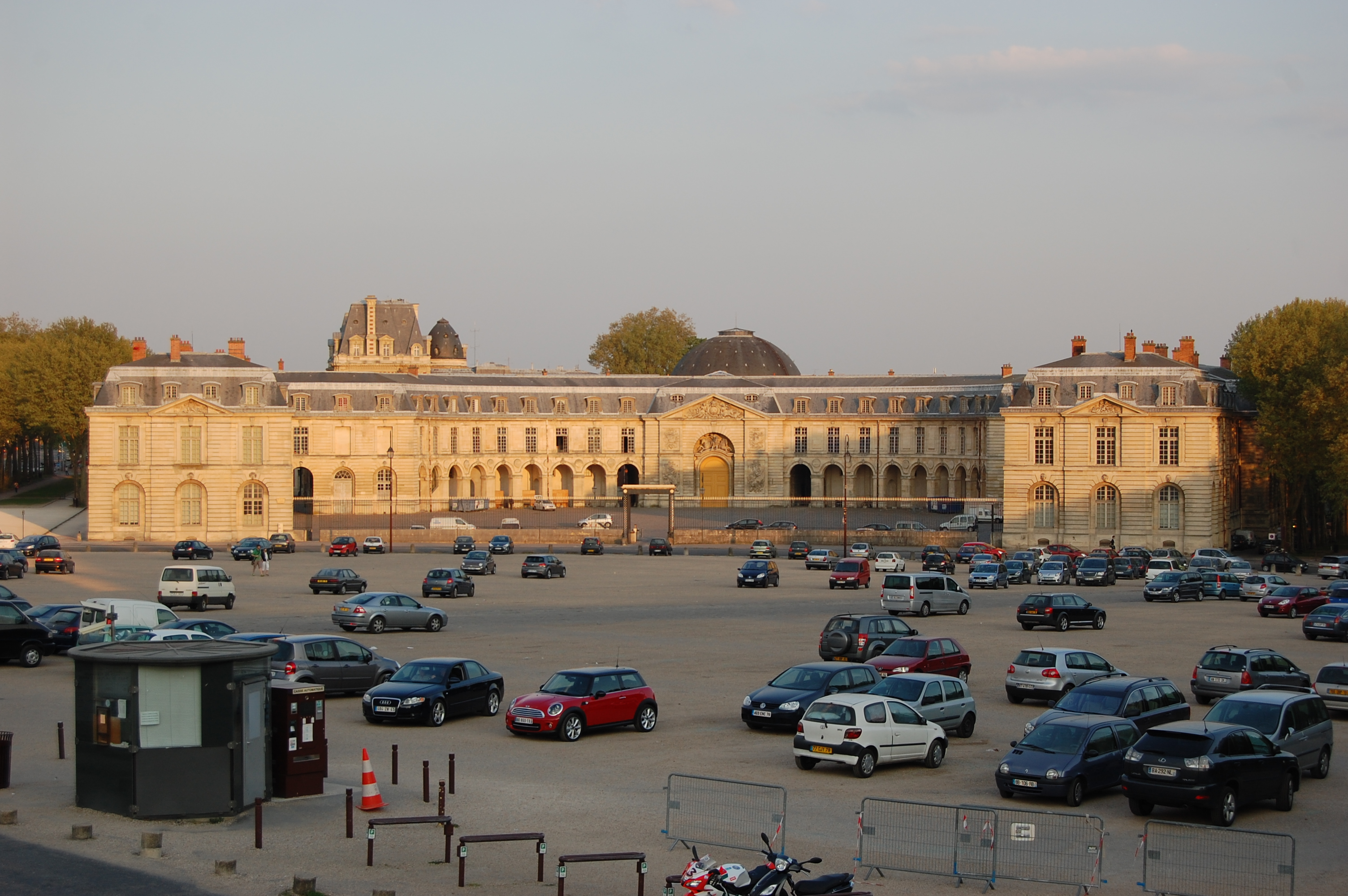 Petite écurie du Château de Versailles